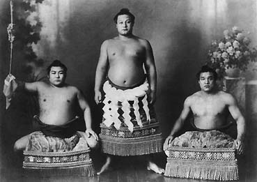 双葉山定次（新横綱）と羽黒山政司（太刀持ち）、名寄岩静男（露払い）